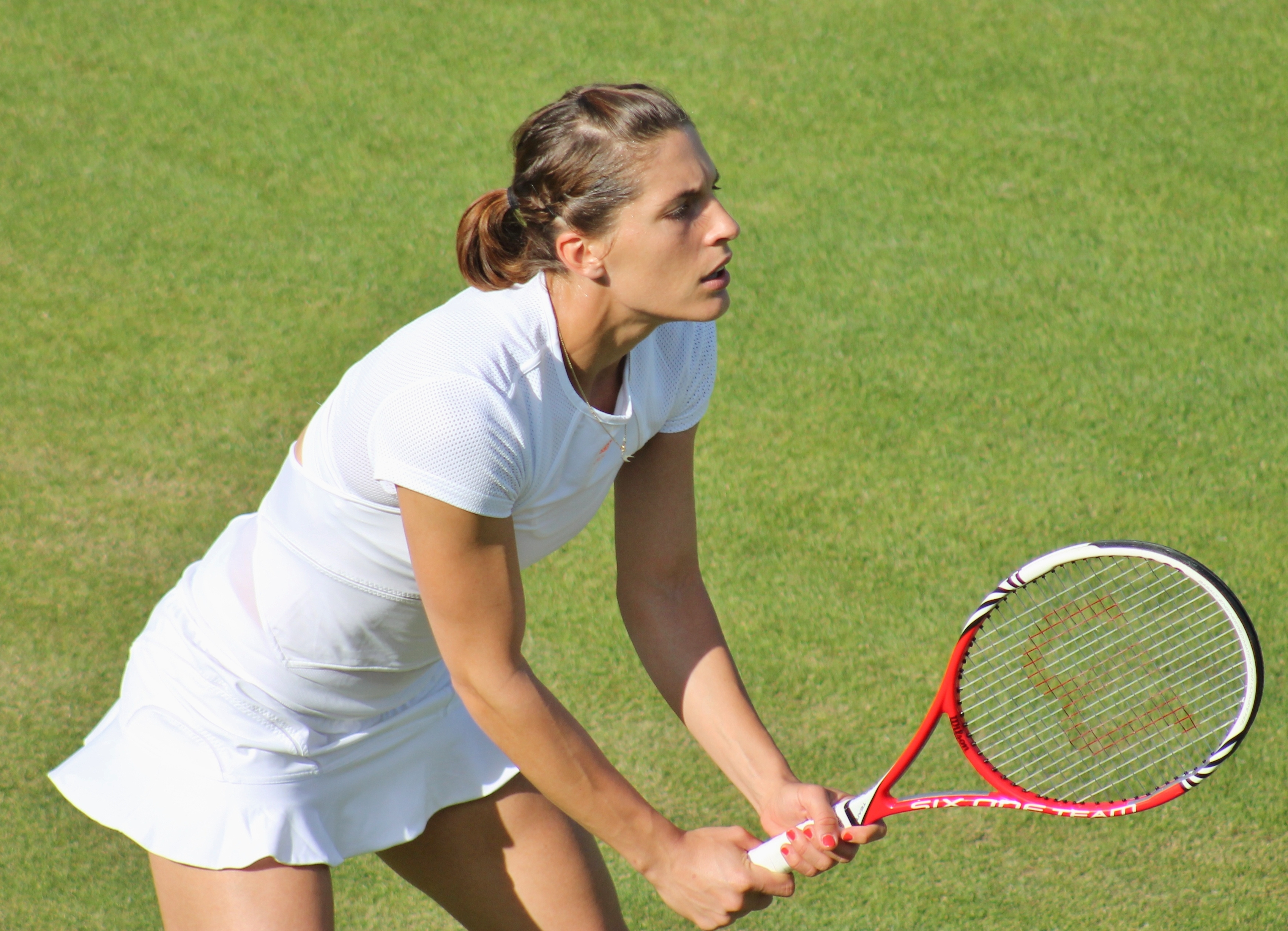 Andrea Petković at 2013 Wimbledon